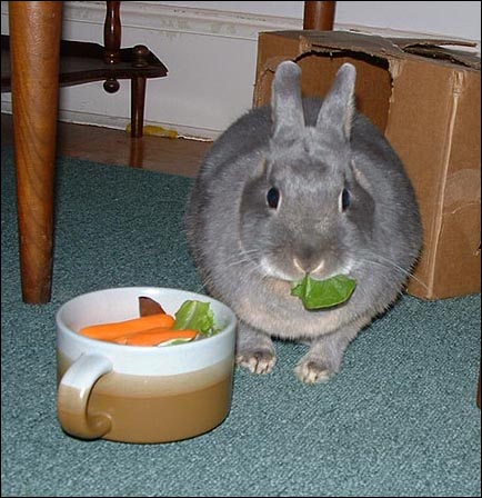 A rabbit eating vegetables.